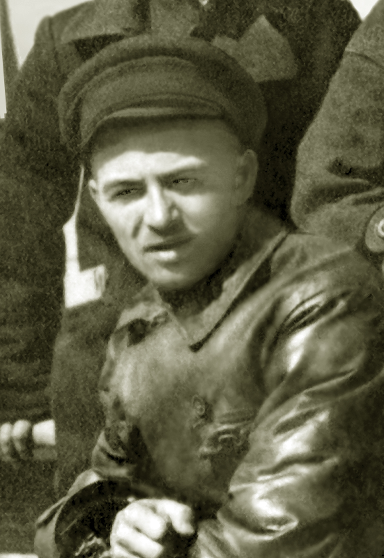 Инструктор (руководитель) Бакинской офицерской школы морской авиации прапорщик В. А. Лебедев